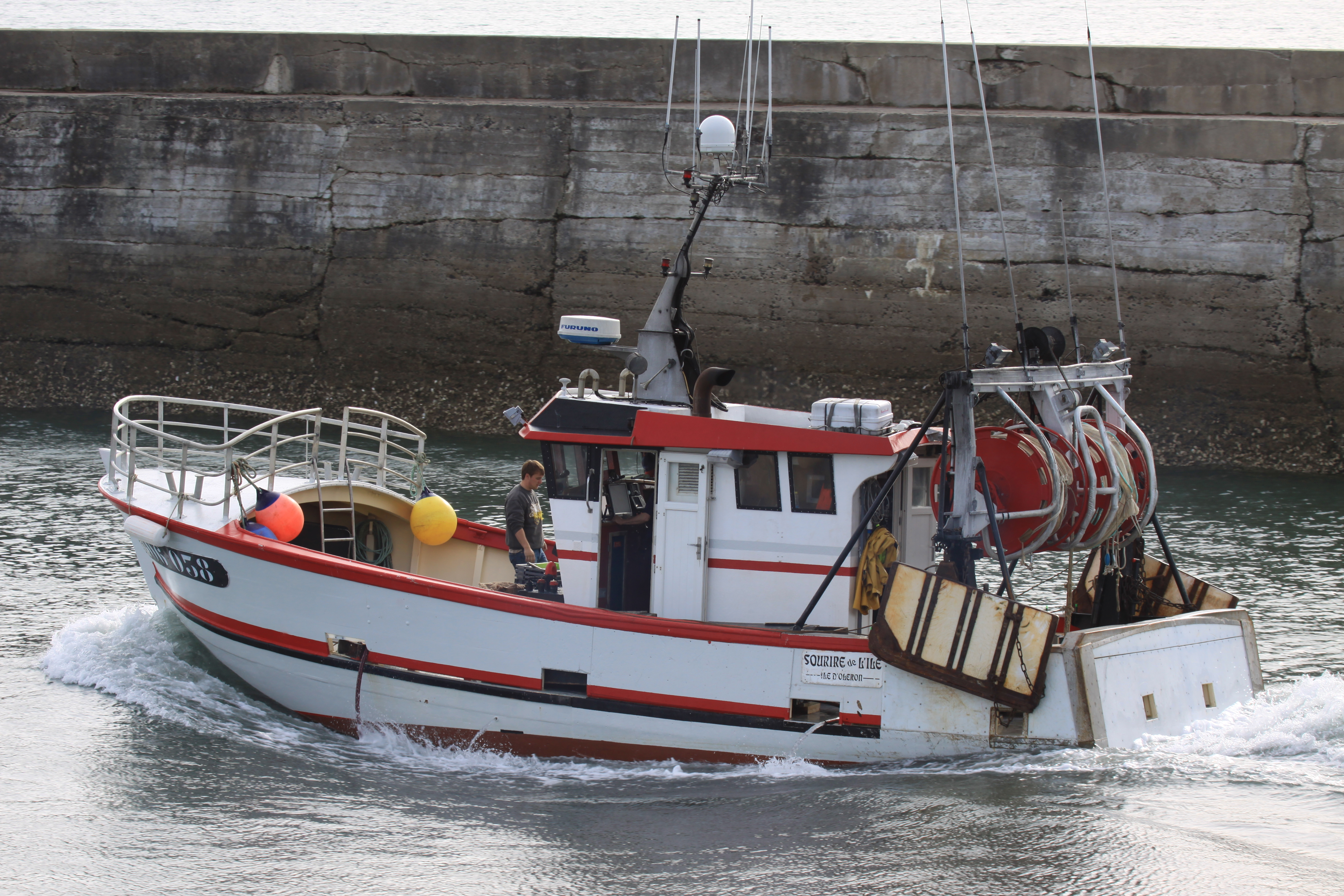 Un chalutier de pêche côtière sortant du port de La Cotinière pour une nuit de pêche. La Cotinière (Commune de Saint-Pierre d' Oléron), Île d' Oléron, Charente Maritime, France.